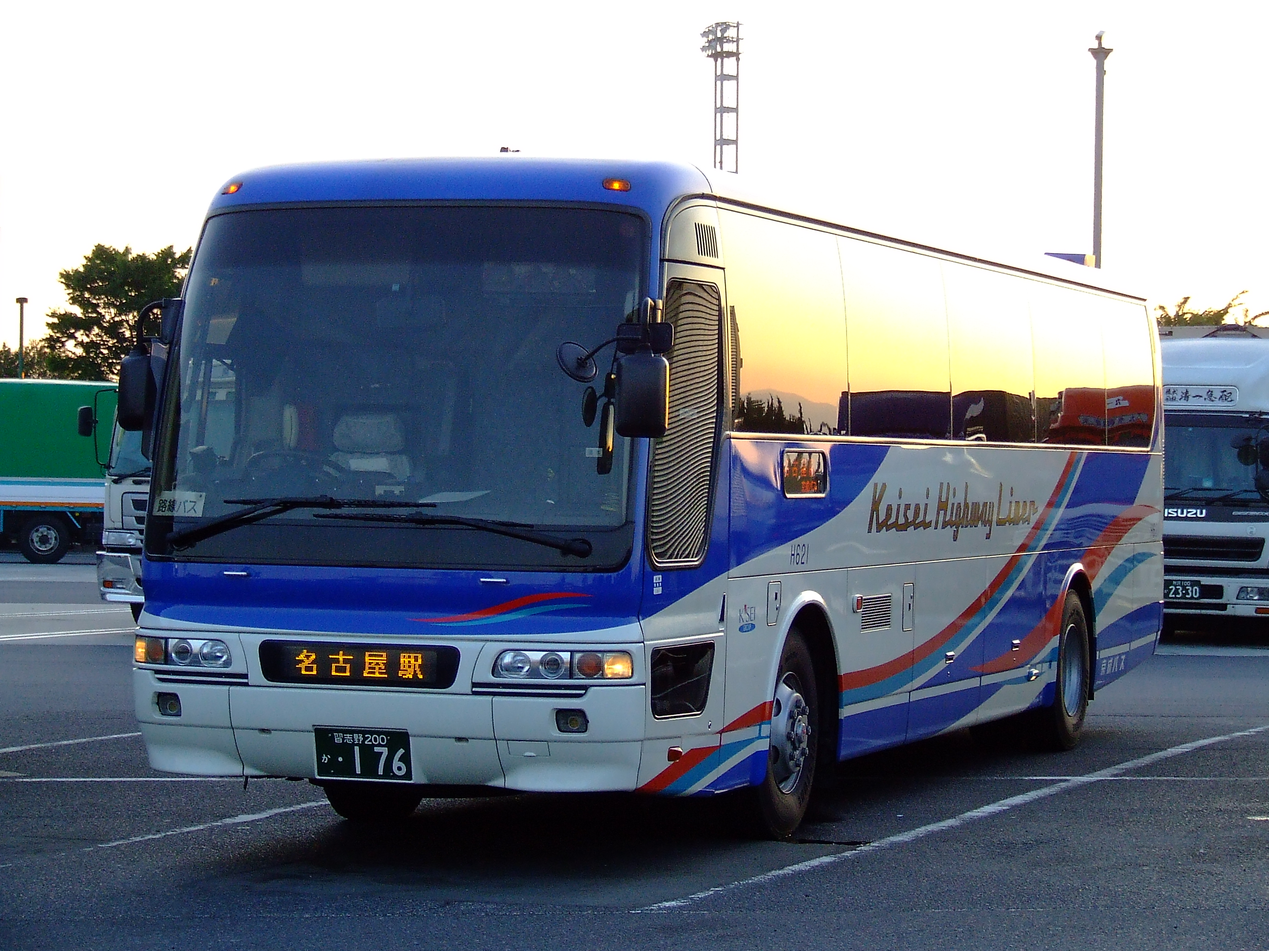 京成バスの夜行高速バス「ファンタジア名古屋」号 上郷サービスエリアにて